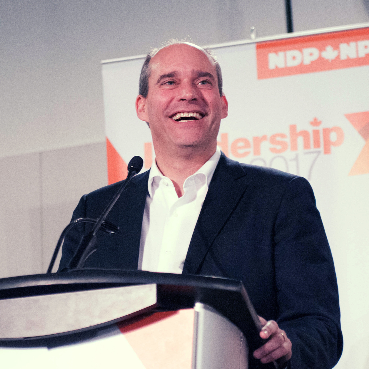 Guy Caron lors du débat de la course à la direction du NPD, à Montréal.